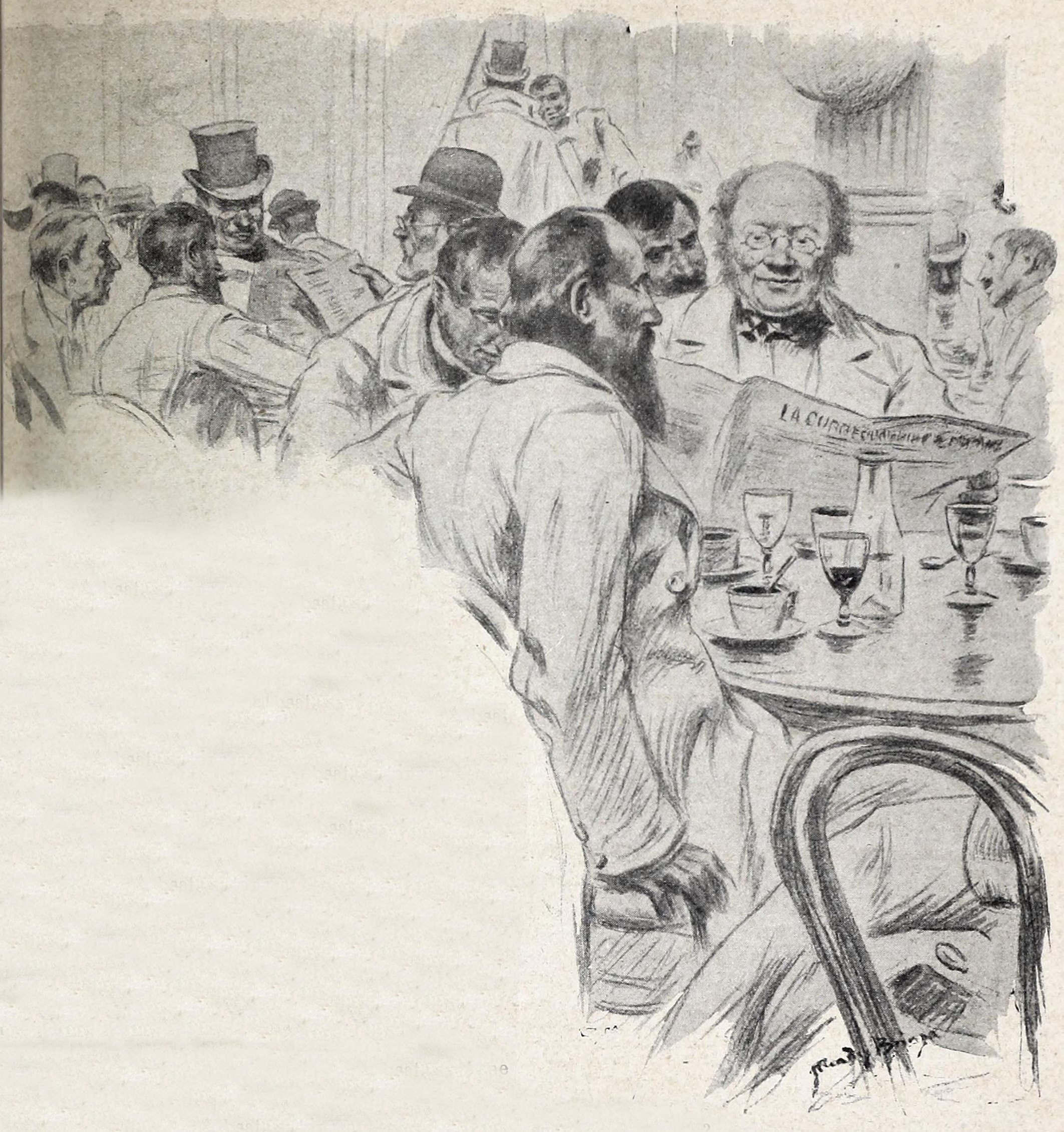 El oro y el cuño.